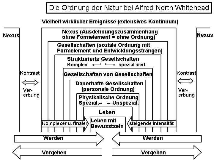 Schematische Darstellung der Struktur der Naturordnung bei Alfred North Whitehead